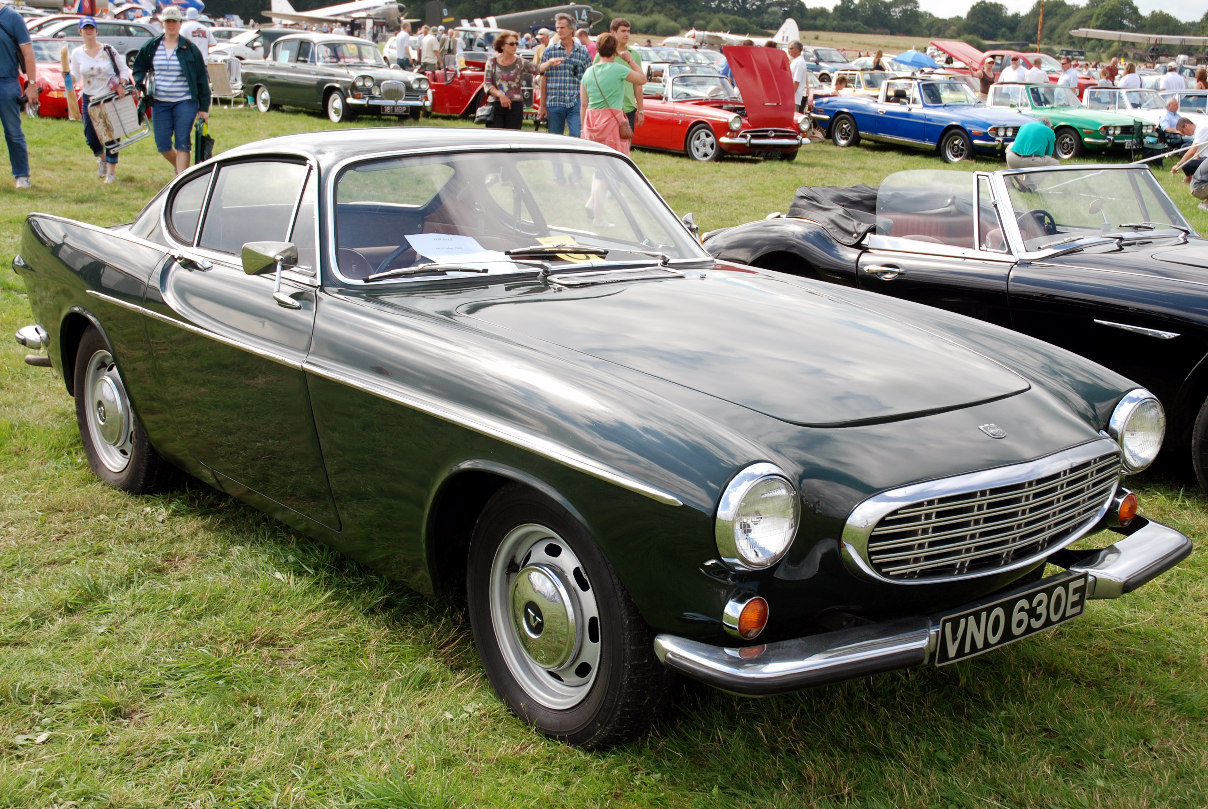 @ Dunsfold Wheels and Wings 2007